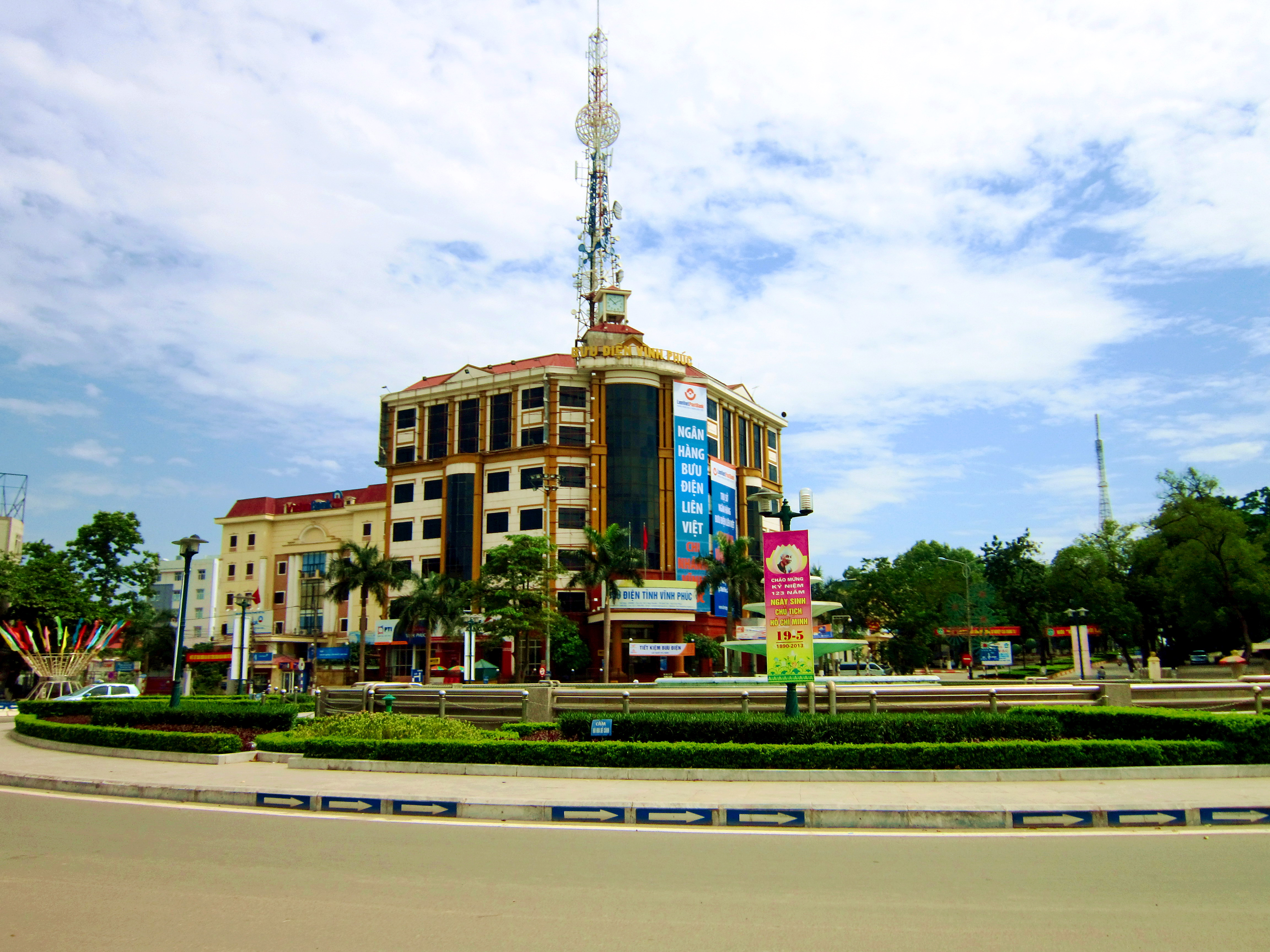 Bưu điện tỉnh Vĩnh Phúc tọa lạc trên đường Ngô Quyền, TP. Vĩnh Yên, tỉnh Vĩnh Phúc, Việt Nam.